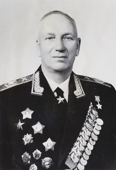 Главный маршал артиллерии Воронов Николай Николаевич. 1966 г.